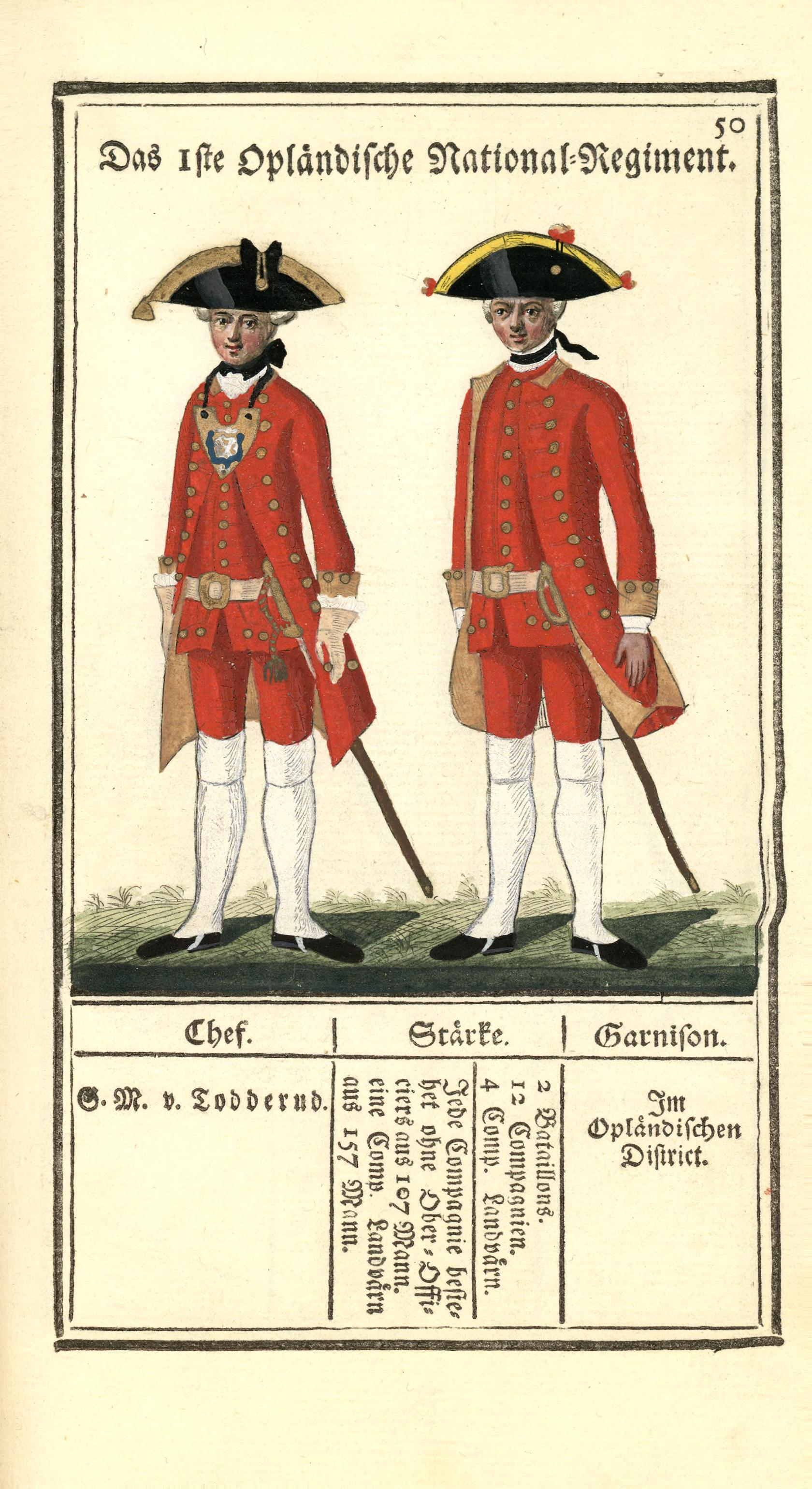 Illustrasjon hentet fra boken "Vorstellung der sämtlichen Königl. Dänischen Armee" av Bertram, Carl og utgitt av Carl Bertram (dk, 1763)